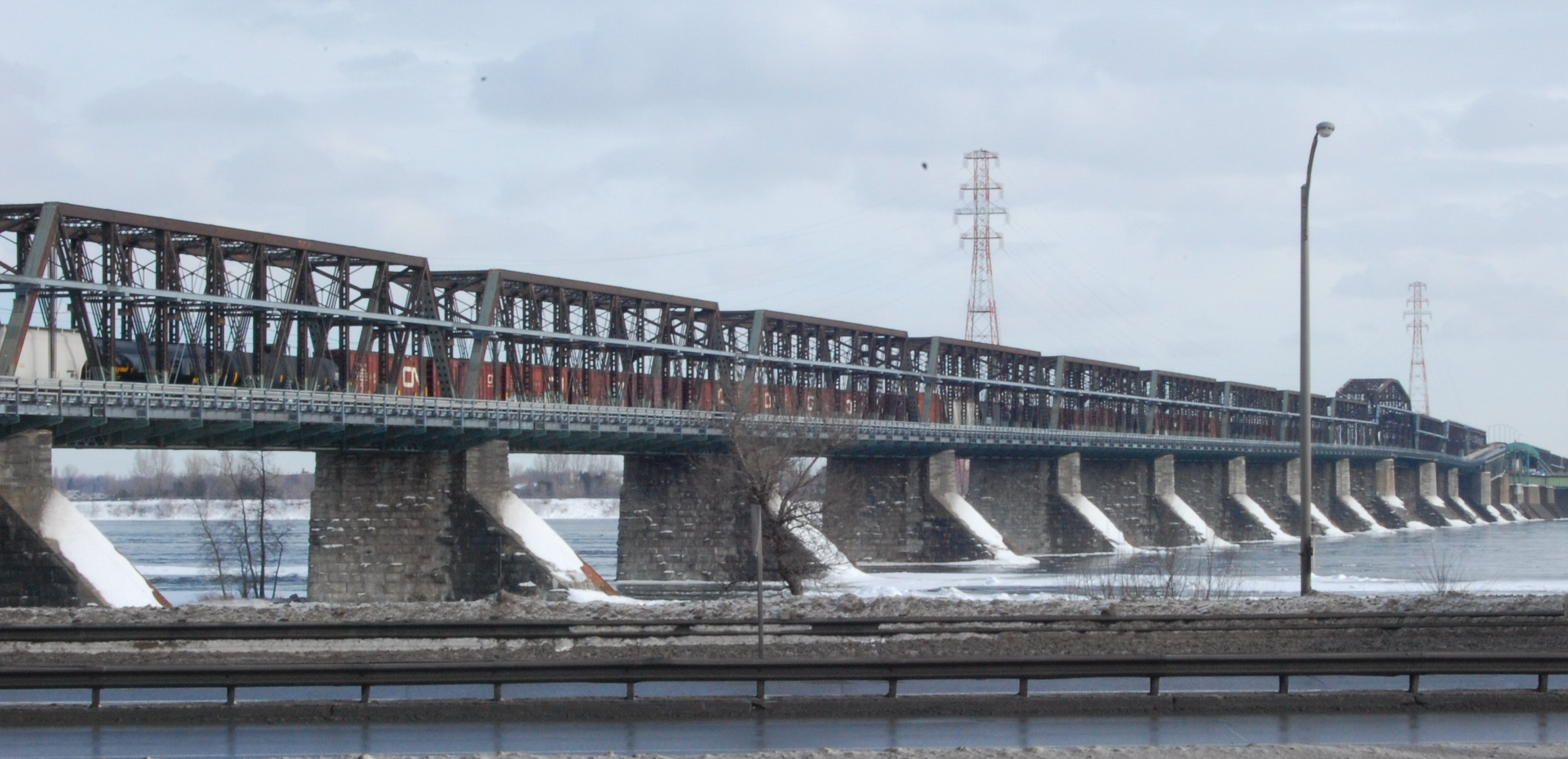 Pont-Victoria enjambeant le Fleuve Saint-Laurent, Montréal, Québec